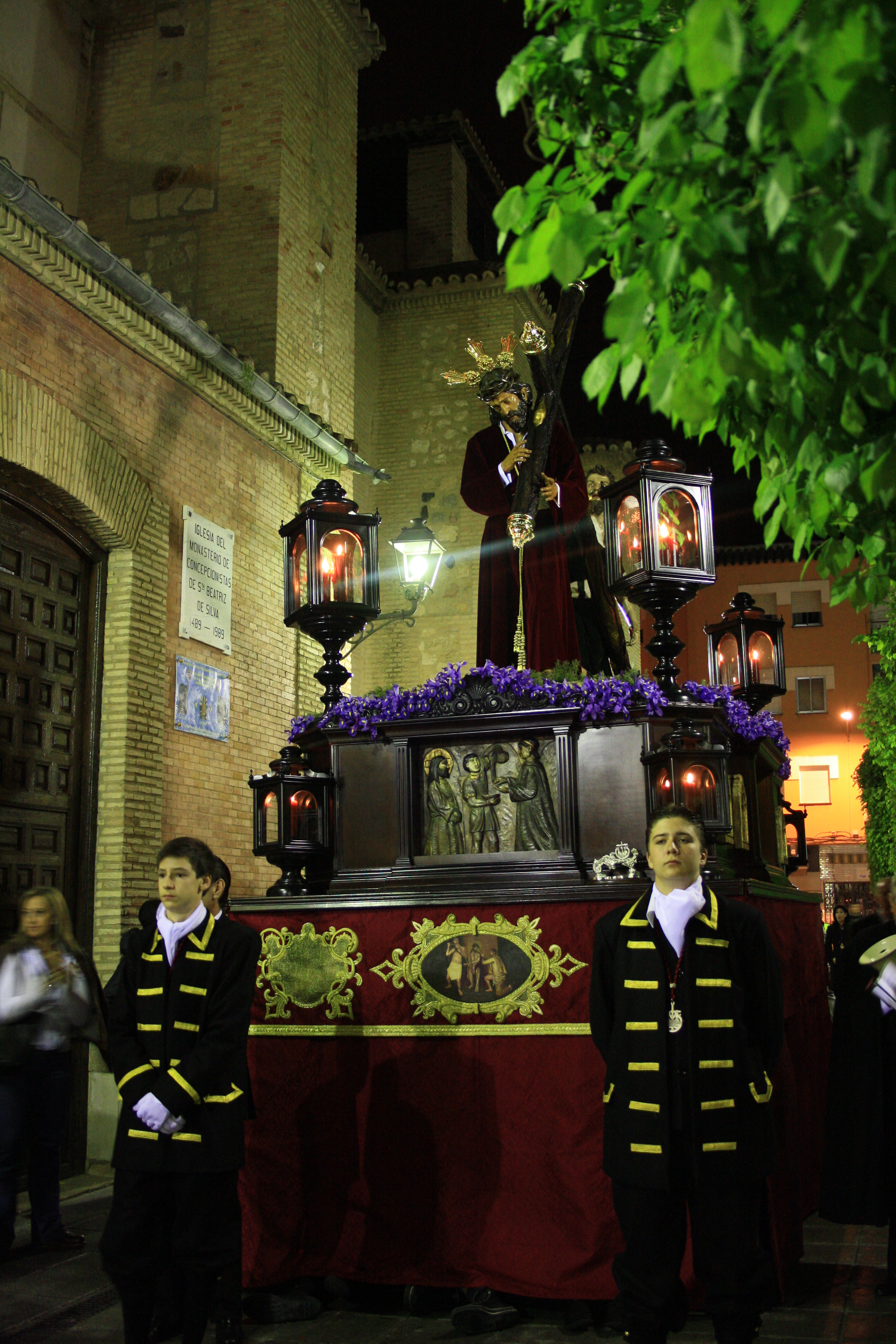 El Señor por las Terreras